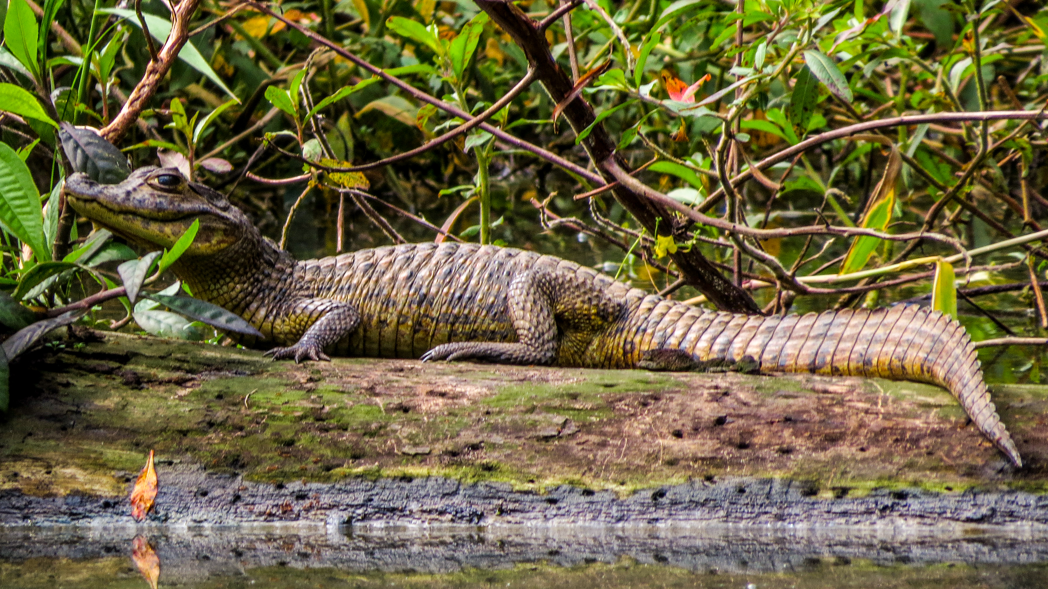 Espécie encontrada no Parque Municipal de Maceió. O parque tem cerca de 82, 4 hectares de área e é considerado uma área de preservação permantente.